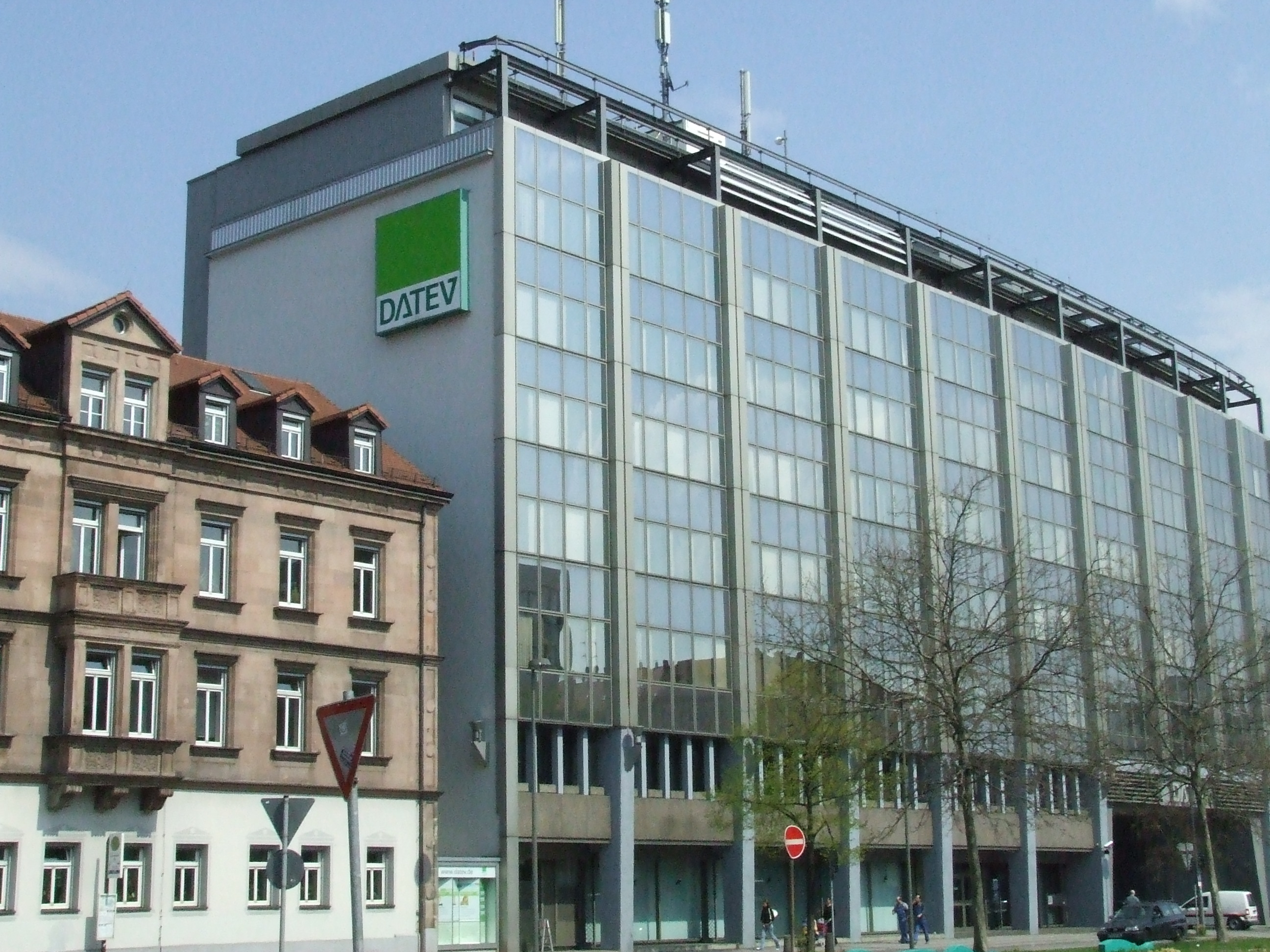 Stadt Nürnberg, Fürther Str., Gebäude des Entwicklungsbereichs der DATEV eG, ursprünglich erbaut vom Spielwarenhersteller Schuco. Südwesten, Frühjahr